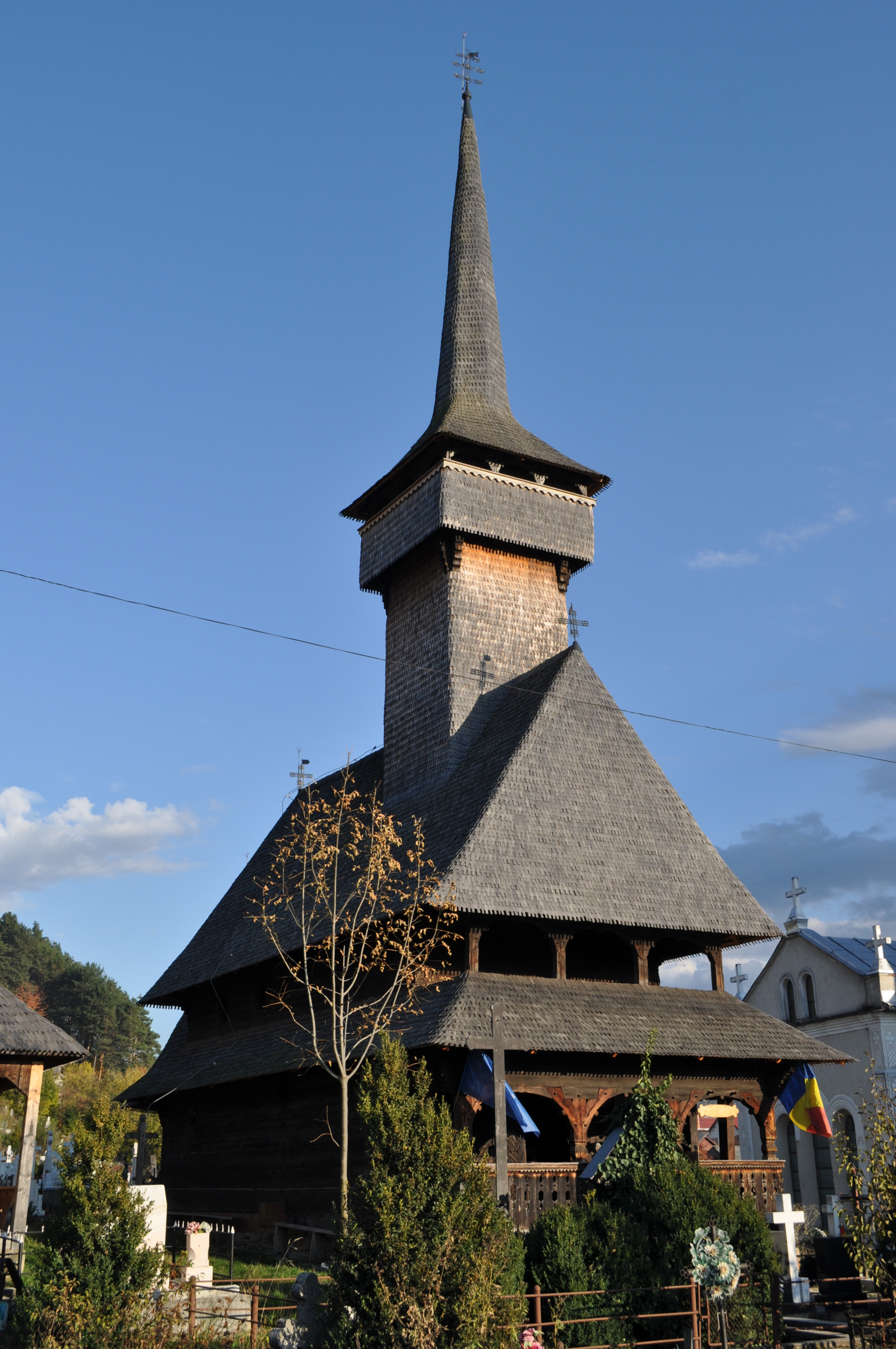 Biserica de lemn "Sf. Arhangheli", oraș Borșa, Str. Eternității 1